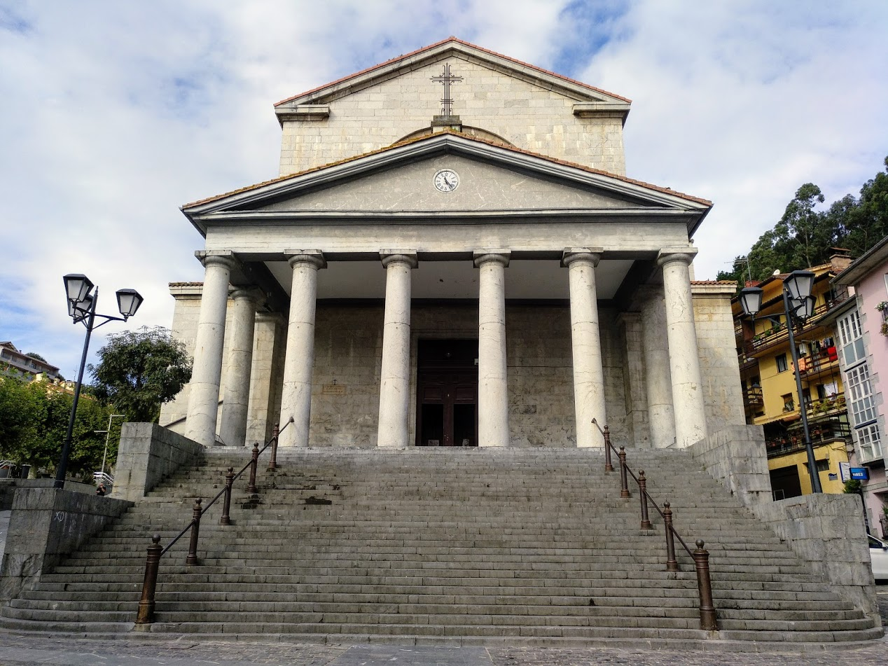 Andre Mariaren Jasokundearen eliza